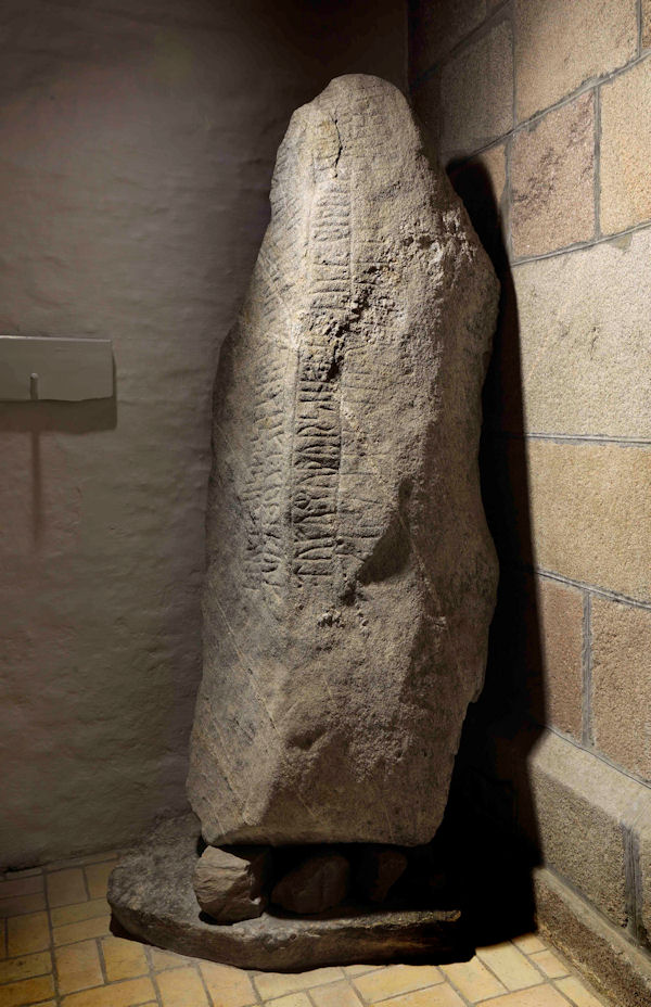 Foto af Roberto Fortuna